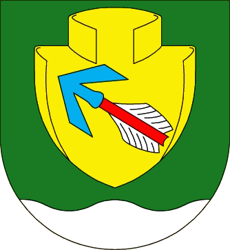 znak obce Novosedly